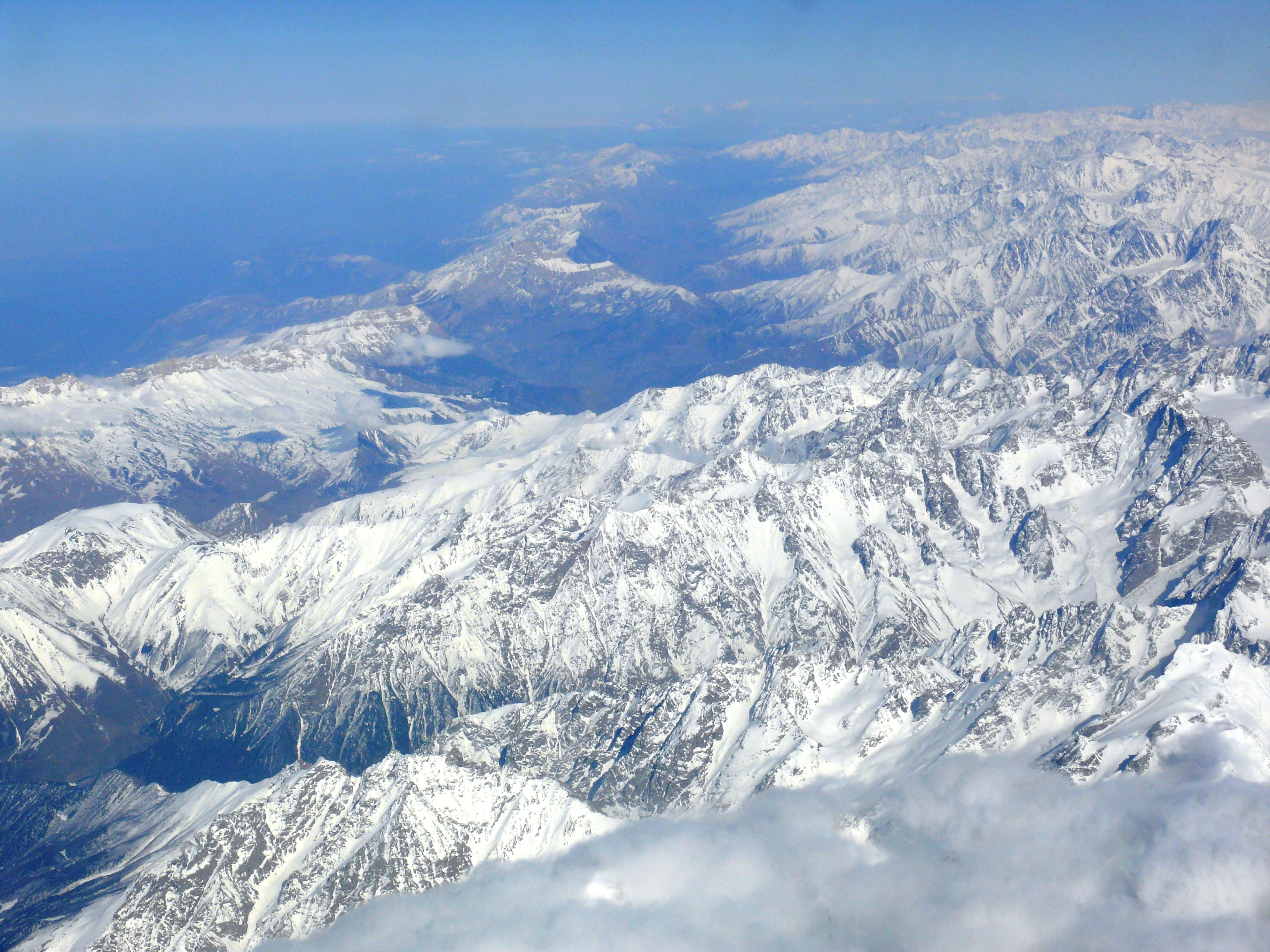 კავკასიონი, Caucasus